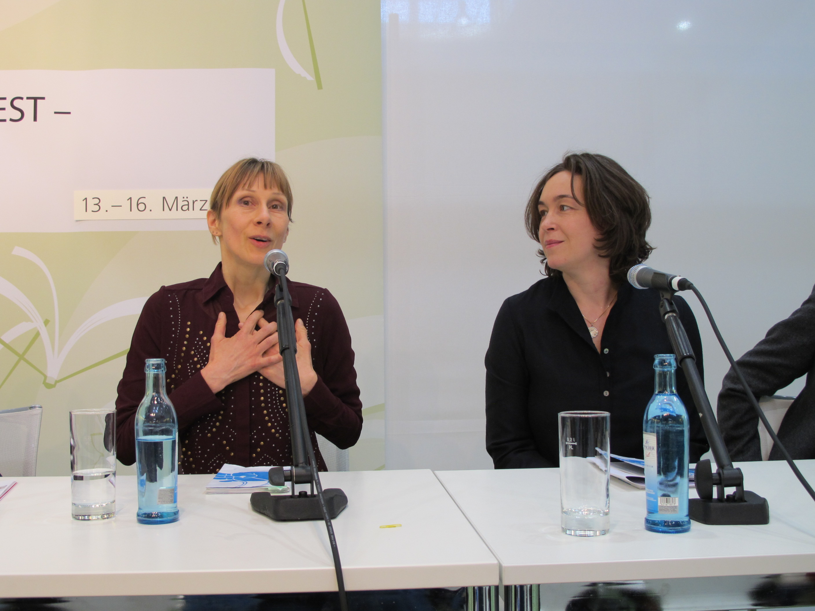 Leipziger Buchmesse 2014, Martina Hefter und Monika Rinck